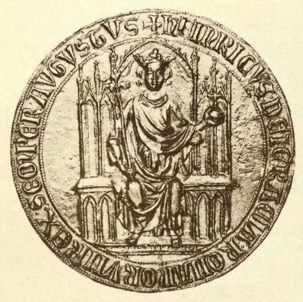 This is a scan of the historical document: Title: Die Siegel der deutschen Kaiser und Könige v. 1 (751 - 1347)